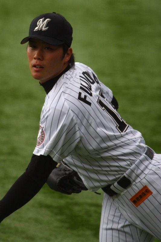 日本プロ野球 千葉ロッテマリーンズ 藤岡貴裕 投手 背番号18